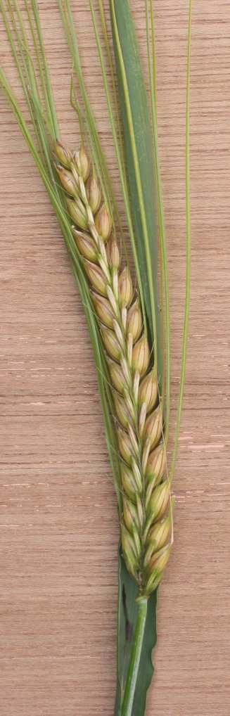 zelfgemaakte foto van aar van tweerijige gerst